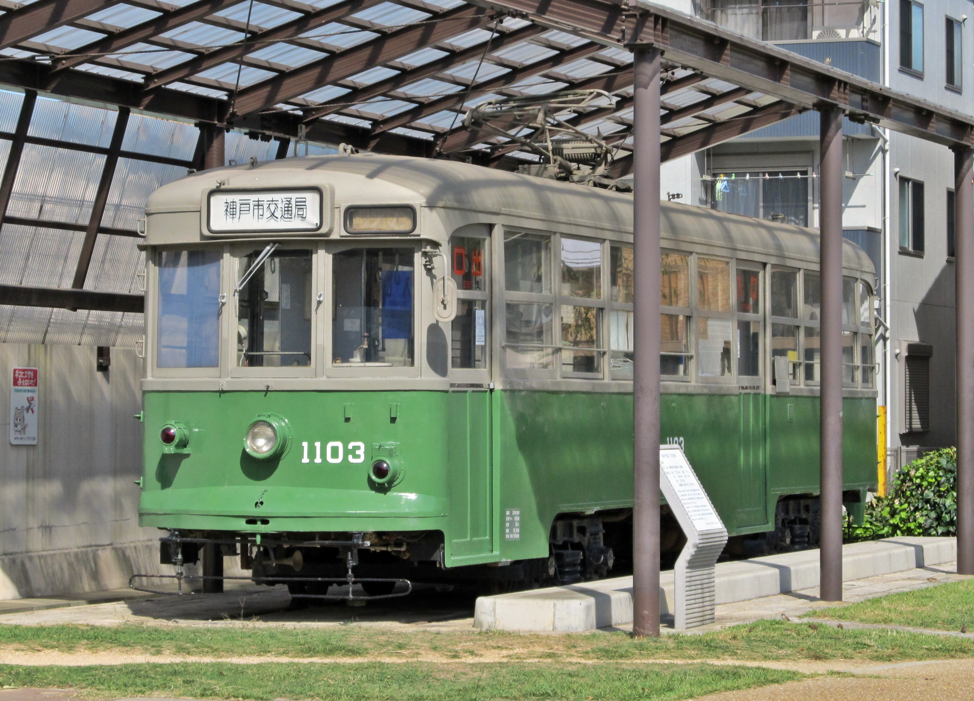 神戸市交通局1100形電車1103号（広島電鉄1100形電車1103号）。御崎公園にて（兵庫県神戸市兵庫区御崎町1丁目2）